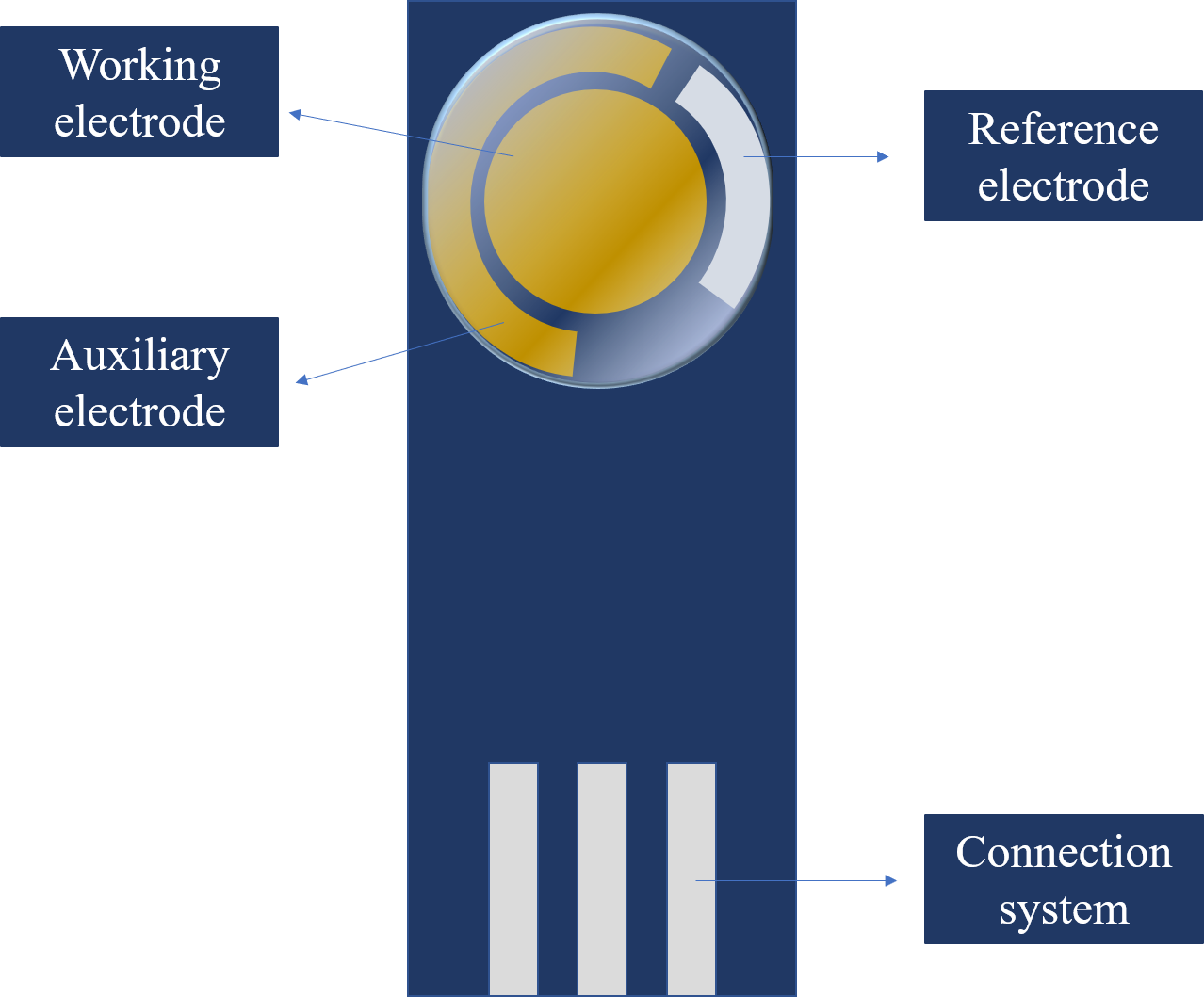 Screen-printed electrode with the three electrode system, reference electrode (RE), working electrode (WE) and auxiliary or counter electrode (AE or CE)